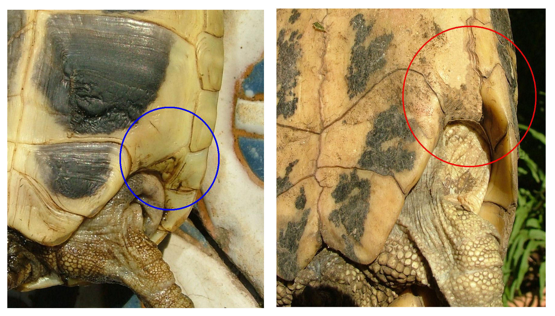 Raffronto inguinali Testudo hermanni Boettgeri e hercegovinensis